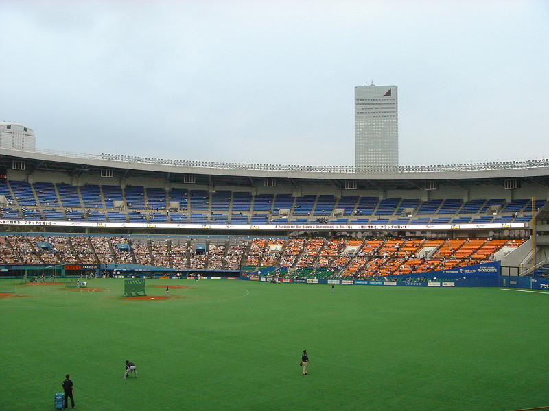 Description 千葉マリンスタジアム内野スタンド （オーロラリボン設置後） Date08/7/9（千葉ロッテマリーンズ対北海道日本ハムファイターズ戦前練習中に撮影）Source投稿者自身による撮影AuthorYamato-iPermission (Reusing this file) PD-self 2008年7月10日 (木) 12:53 . . Yamato-i . . 800×600 (174 キロバイト) 千葉マリンスタジアム内野スタンド （オーロラリボン設置後）